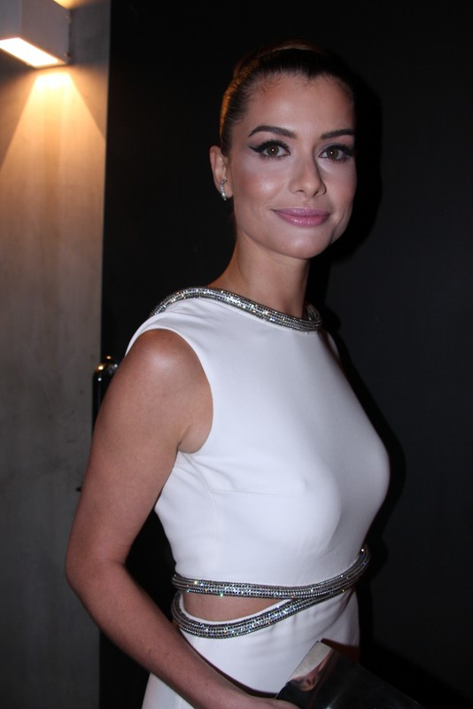 9 - Aline Moraes